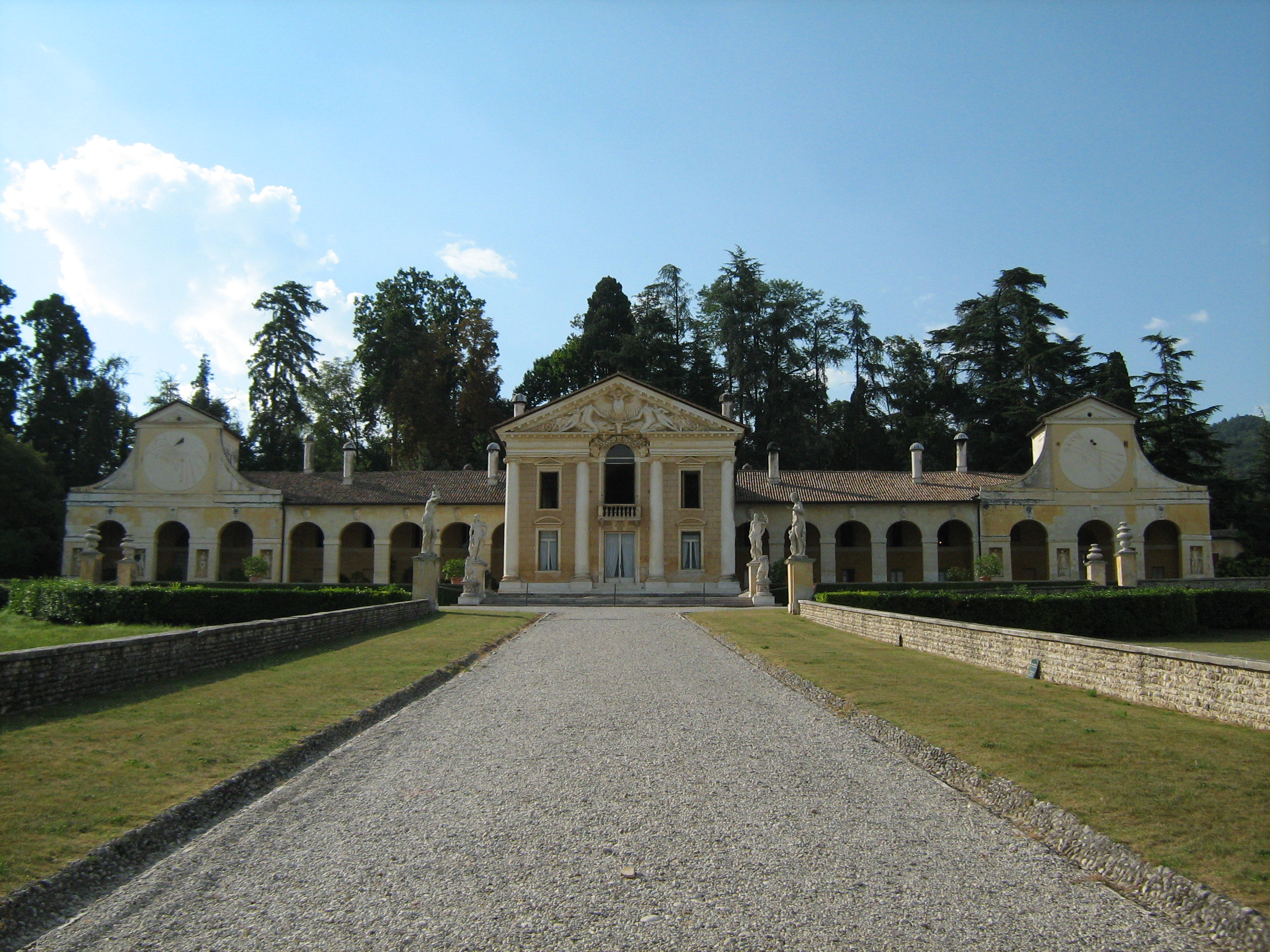 Villa Barbaro i Maser, Veneto, Italien. Tegnet af Andrea Palladio. 11. august 2012.